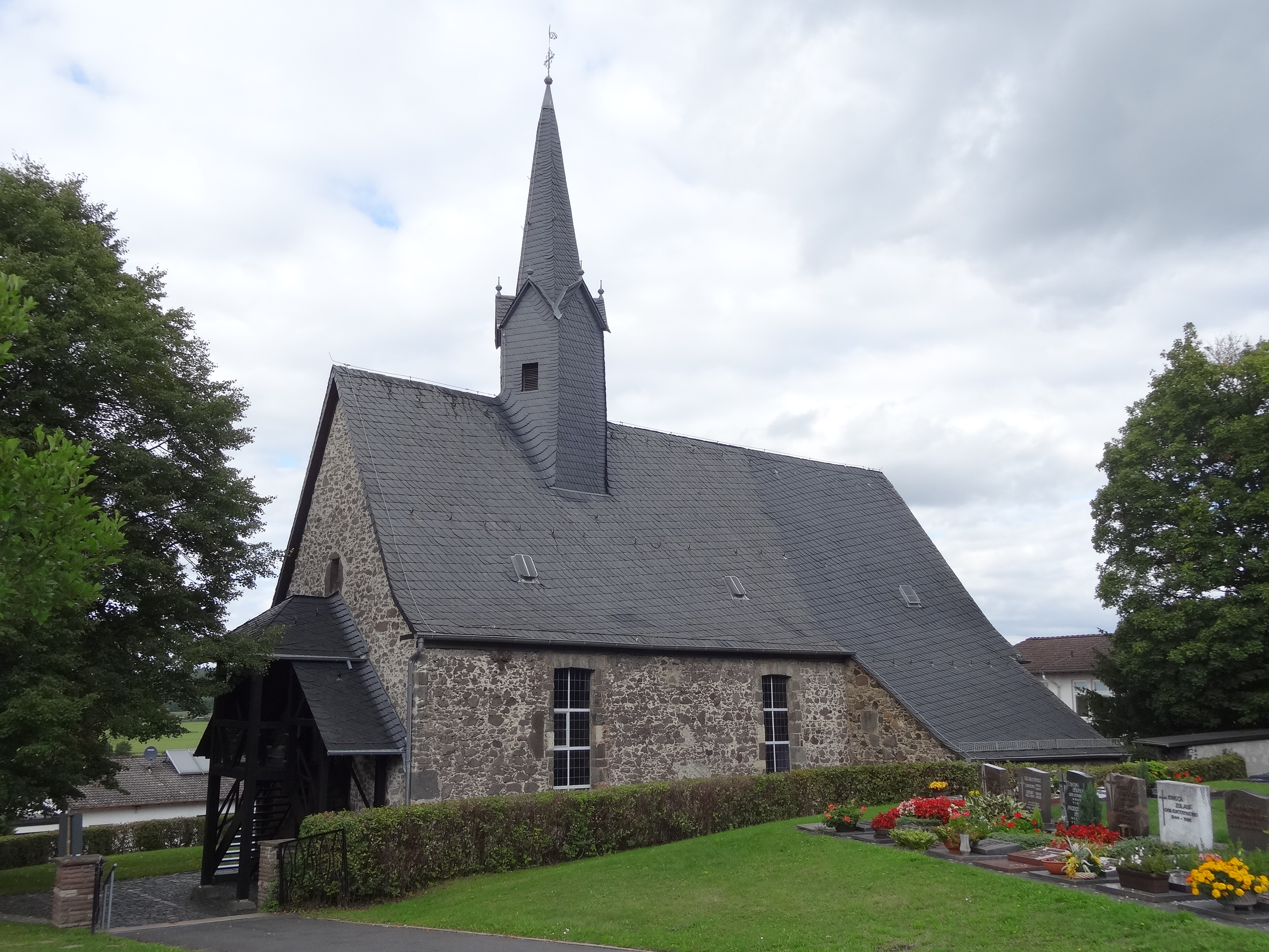 Alte Kirche (Watzenborn-Steinberg)